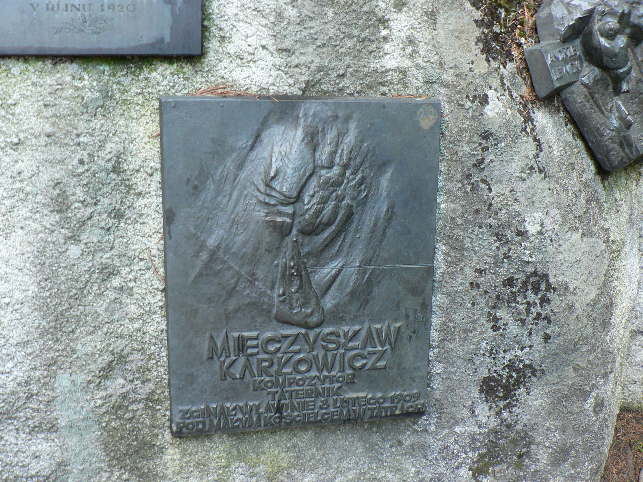 Symboliczny cmentarz ofiar Tatr, tablica ku czci Mieczysława Karłowicza